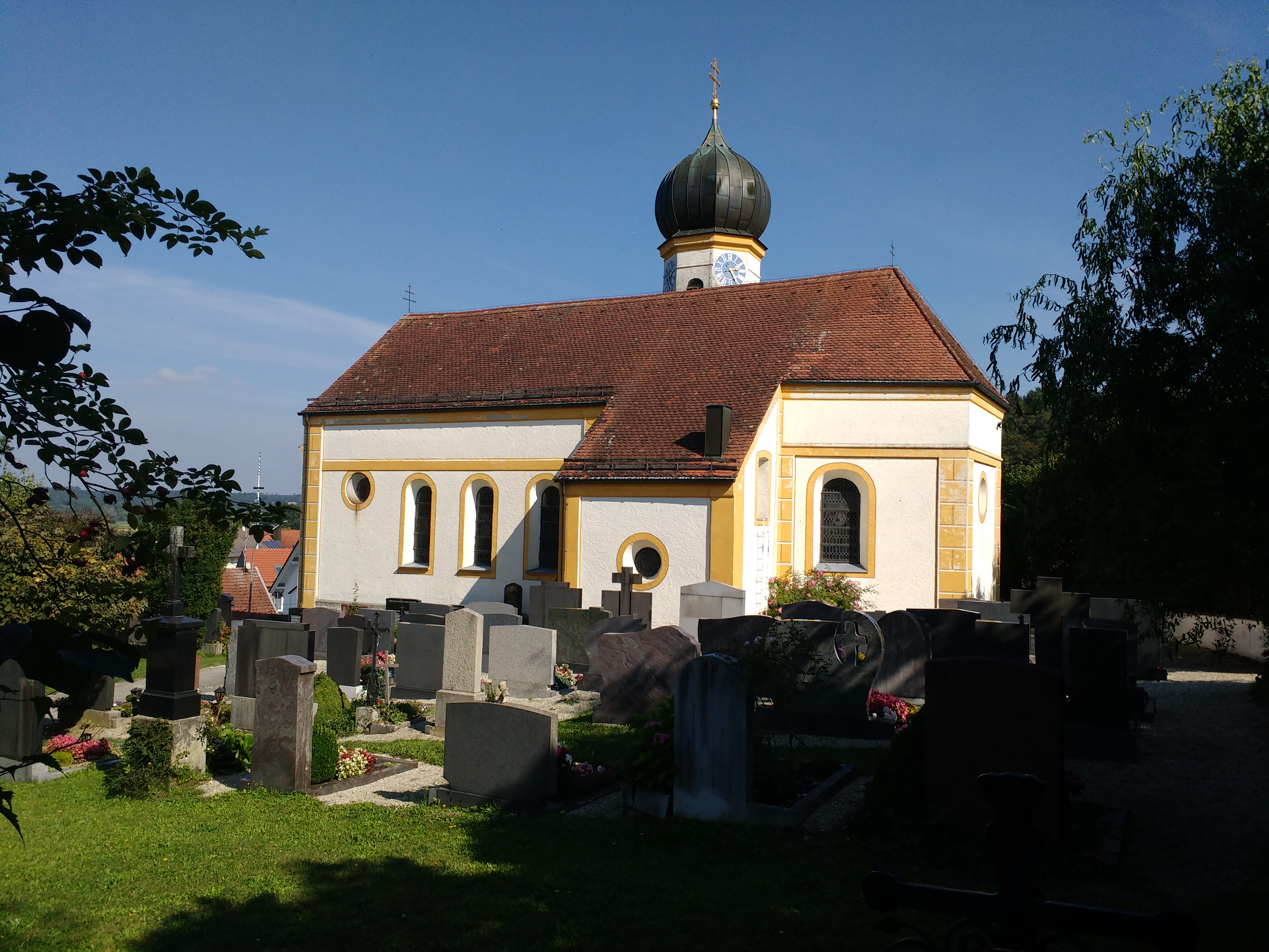 Katholische Pfarrkirche St Laurentius im Freisinger Stadtteil Haindlfing. Der Kirchenbau steht unter Denkmalschutz (Aktenzeichen D-1-78-124-260).This is a photograph of an architectural monument.